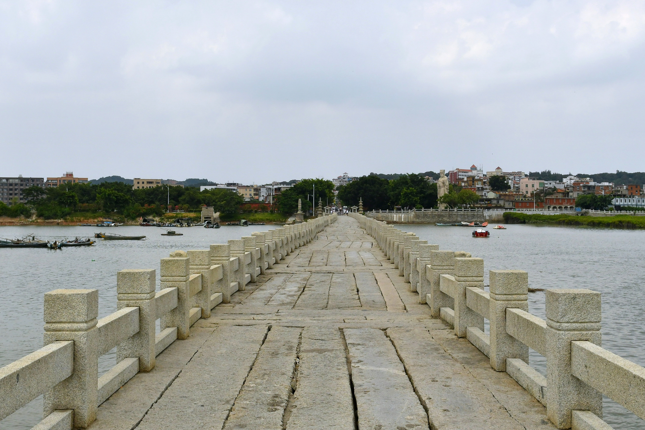 泉州洛阳桥上铺设的石板